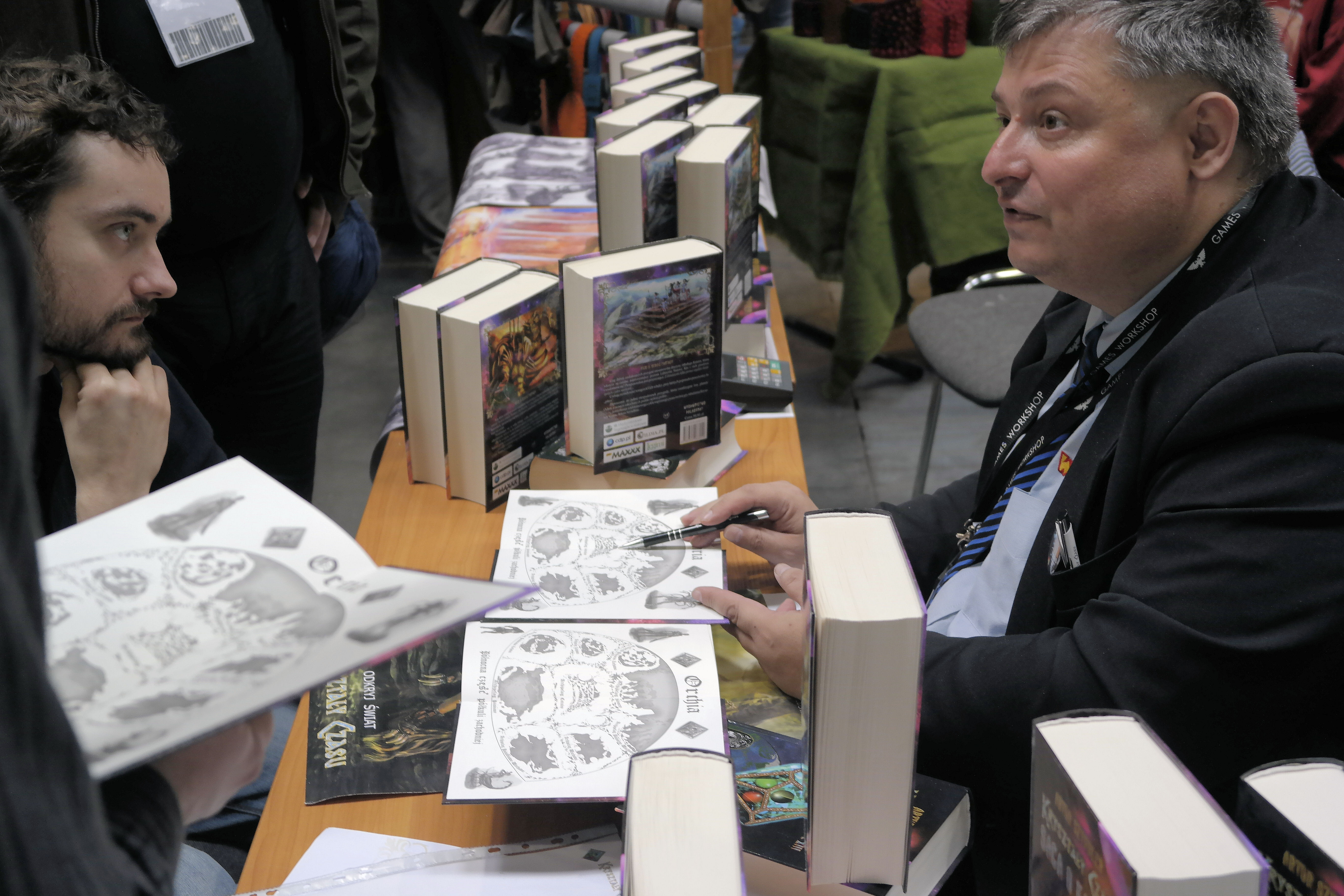 Artur Szyndler, twórca gry Kryształy Czasu